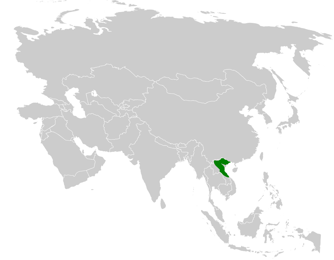 Phylloscopus calciatilis distribution map, based on